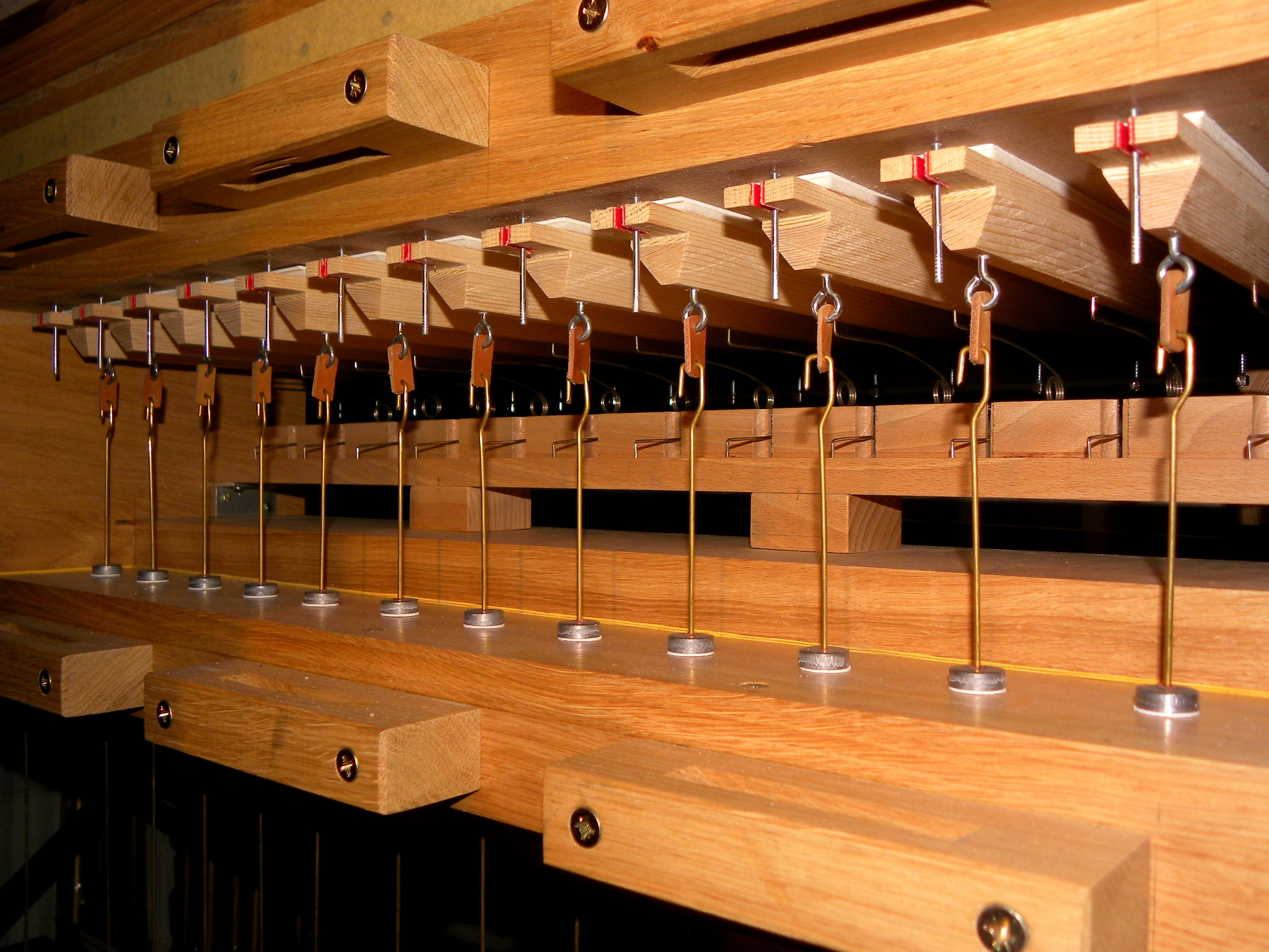 Schleiflade Tonventile